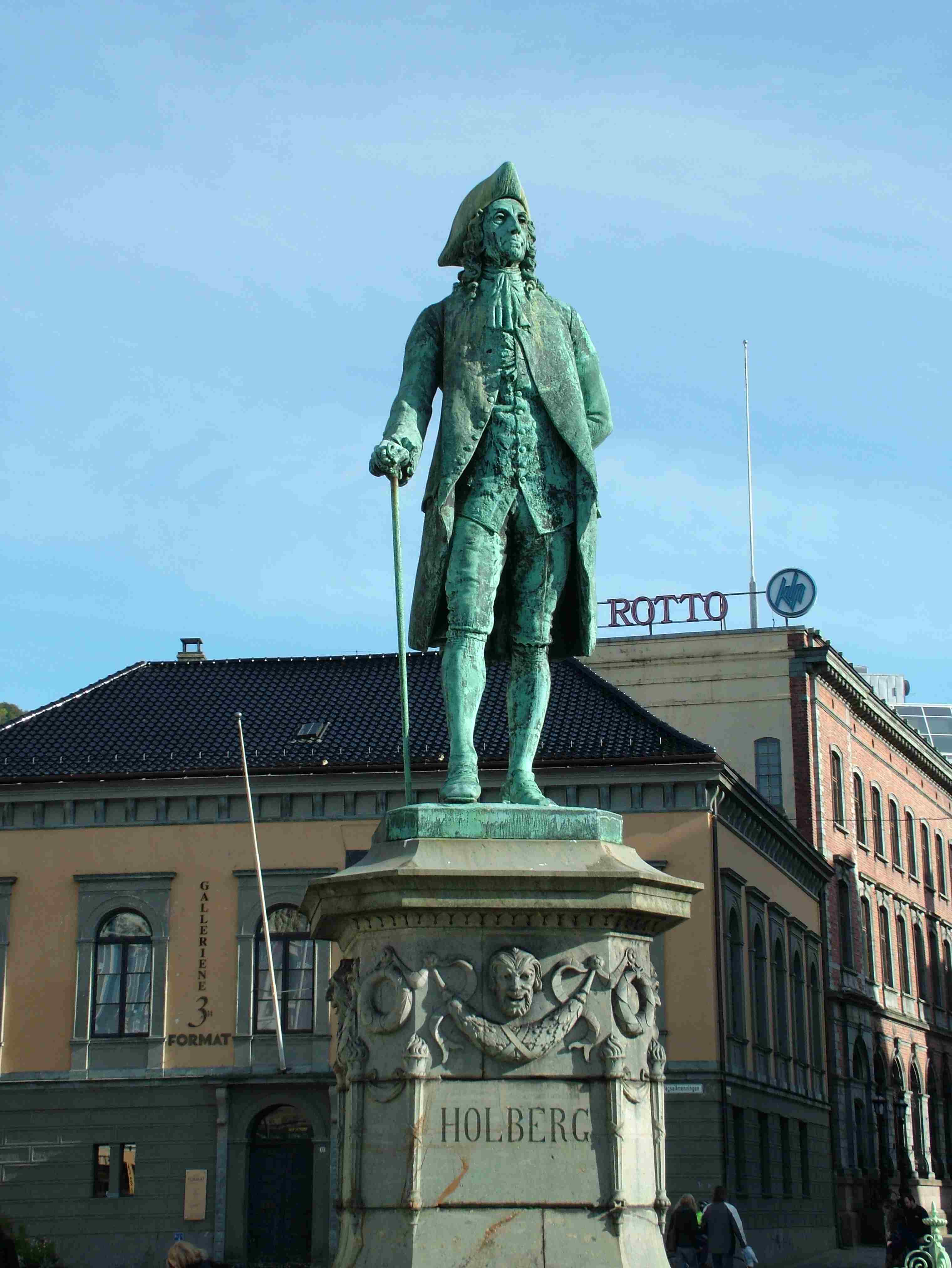 Bergin in Norwegen. Das Denkmal fpr Ludvig Holberg steht in der Fußgängerzone in der Nähe des Hafens in Bergen.